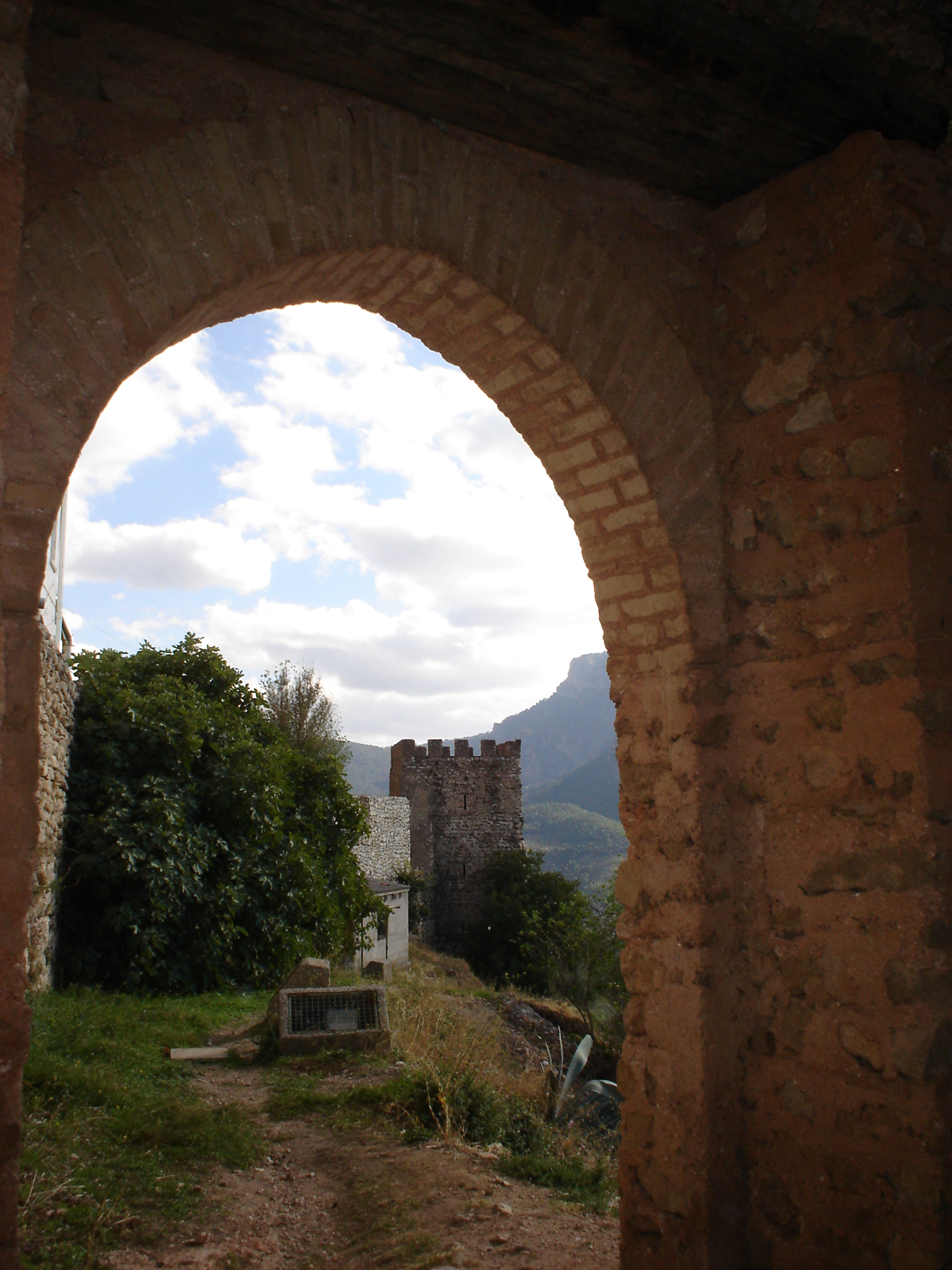 Parte del recinto amurallado de Segura de la Sierra